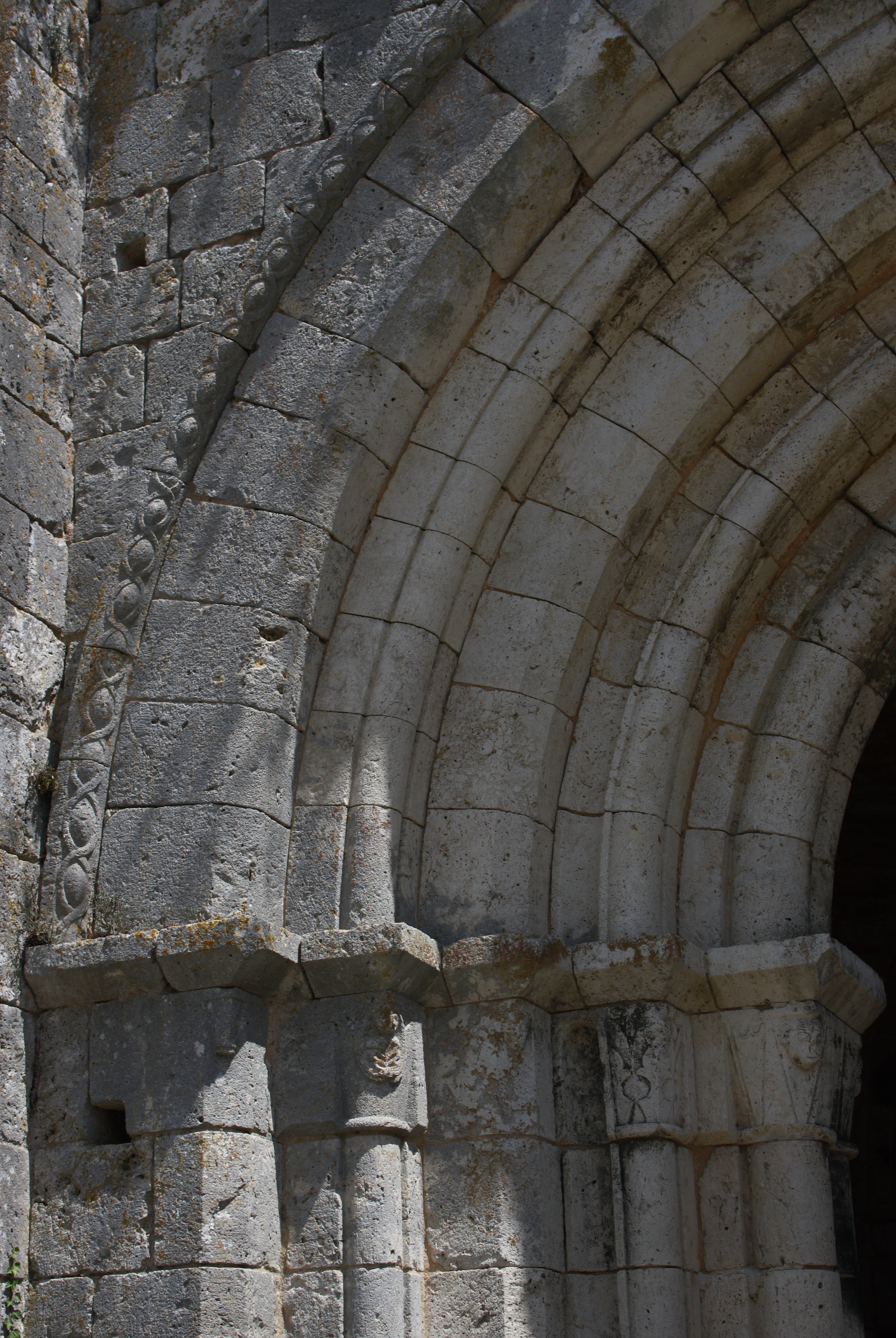 Ehemaliges Priorat Saint-André in Château-Landon, einer Gemeinde im Département Seine-et-Marne (Île-de-France), aus der Mitte des 12. Jahrhunderts, romanisches Stufenportal